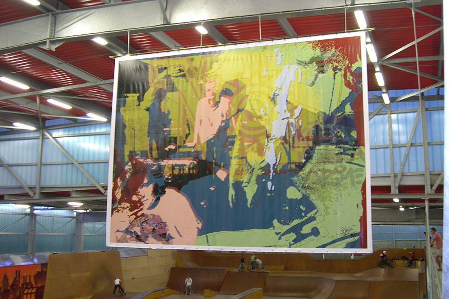 Phil. Macquet : Halle de glisse (Skate Park) de Lille